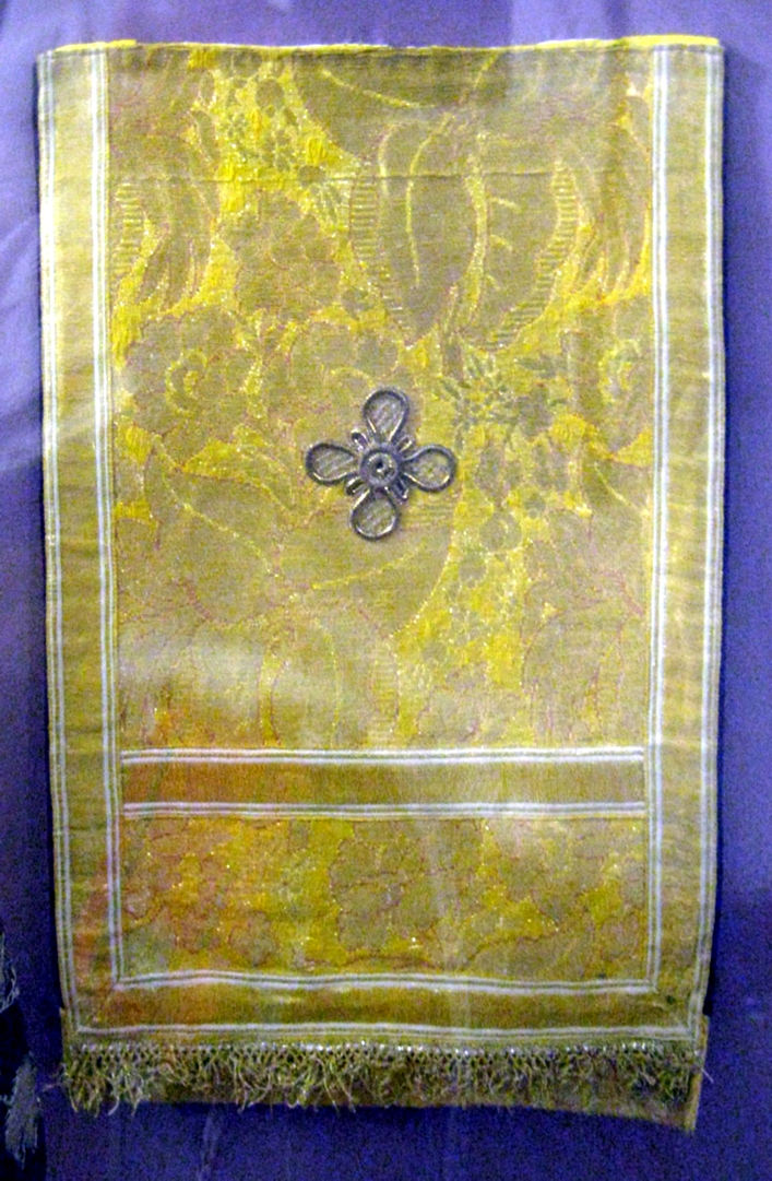 Набедренник, 19 век. Кирилло-Белозерский монастырь